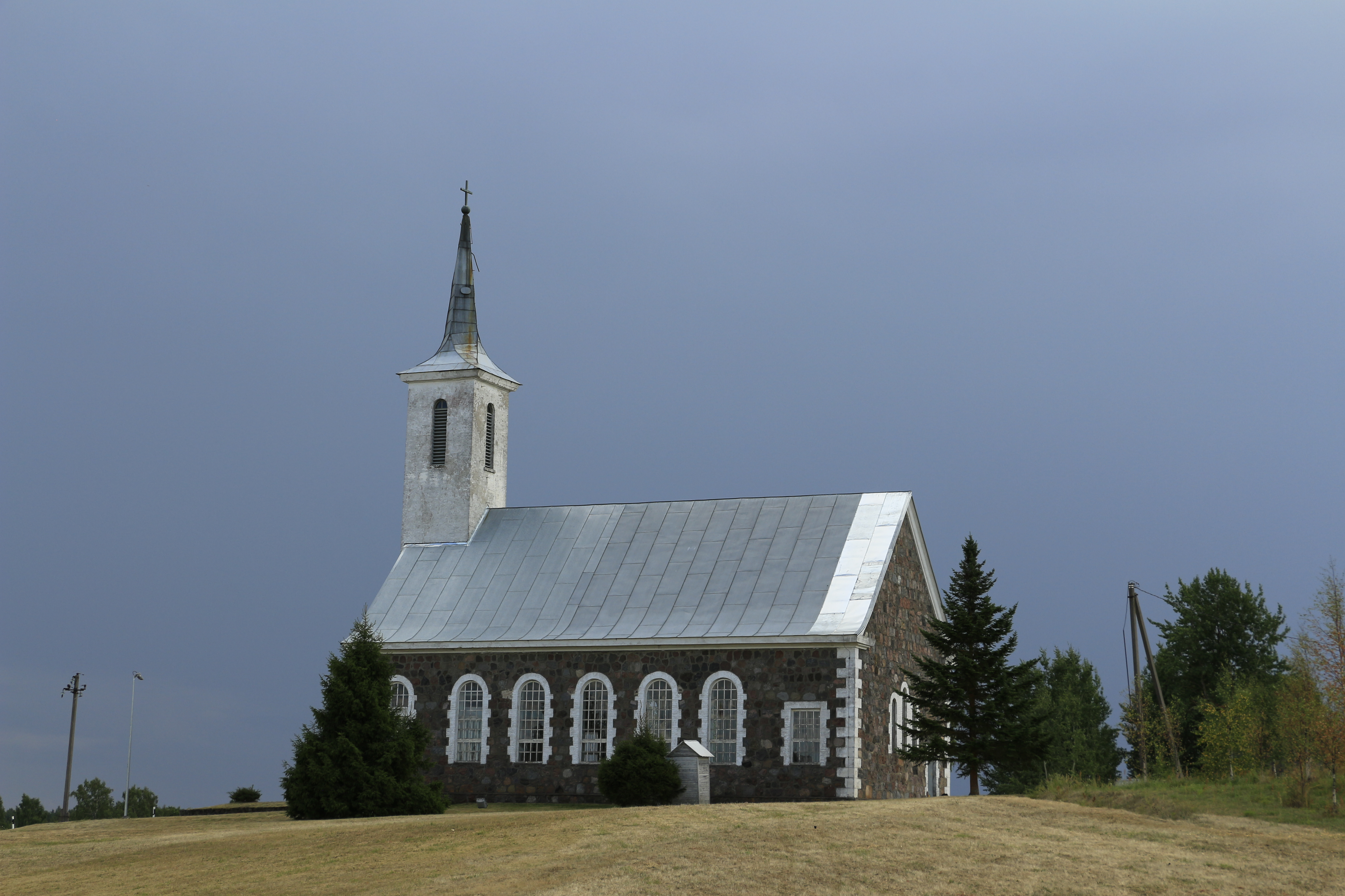 Tudulinna kirik